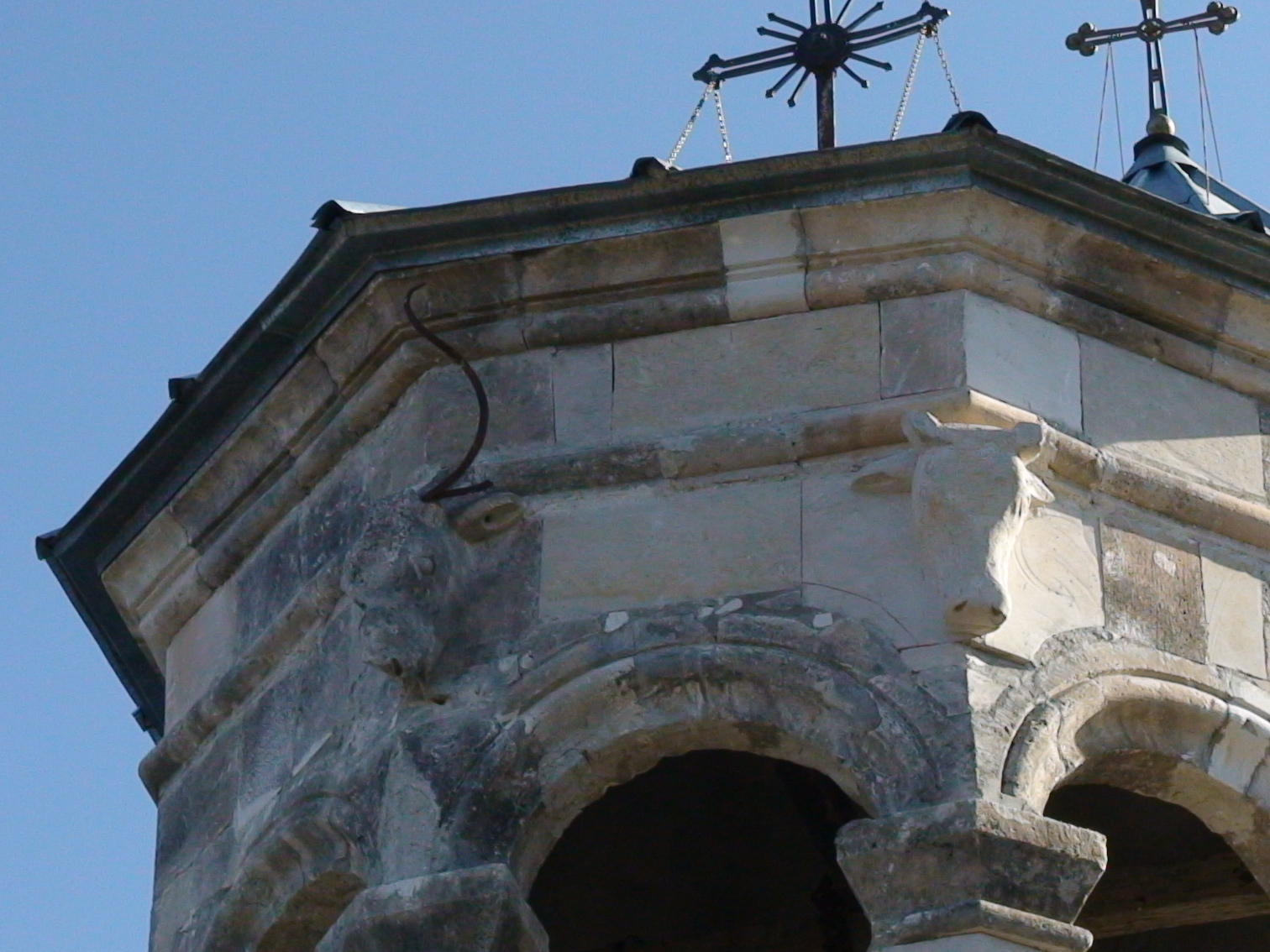 აღდგენილი მრავალძლის წმინდა გიორგის ტაძარი. ხარისა და ძროხის გამოსახულებები